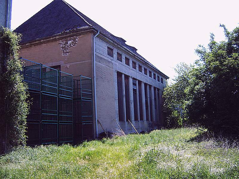 Sprenglufthalle, auch "Lindenbau" im Volksmund, des Reichsschwefelwerkes in Haßmersheim